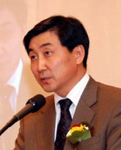 이종걸. 범국민지식재산권보호연합회 출범식에서